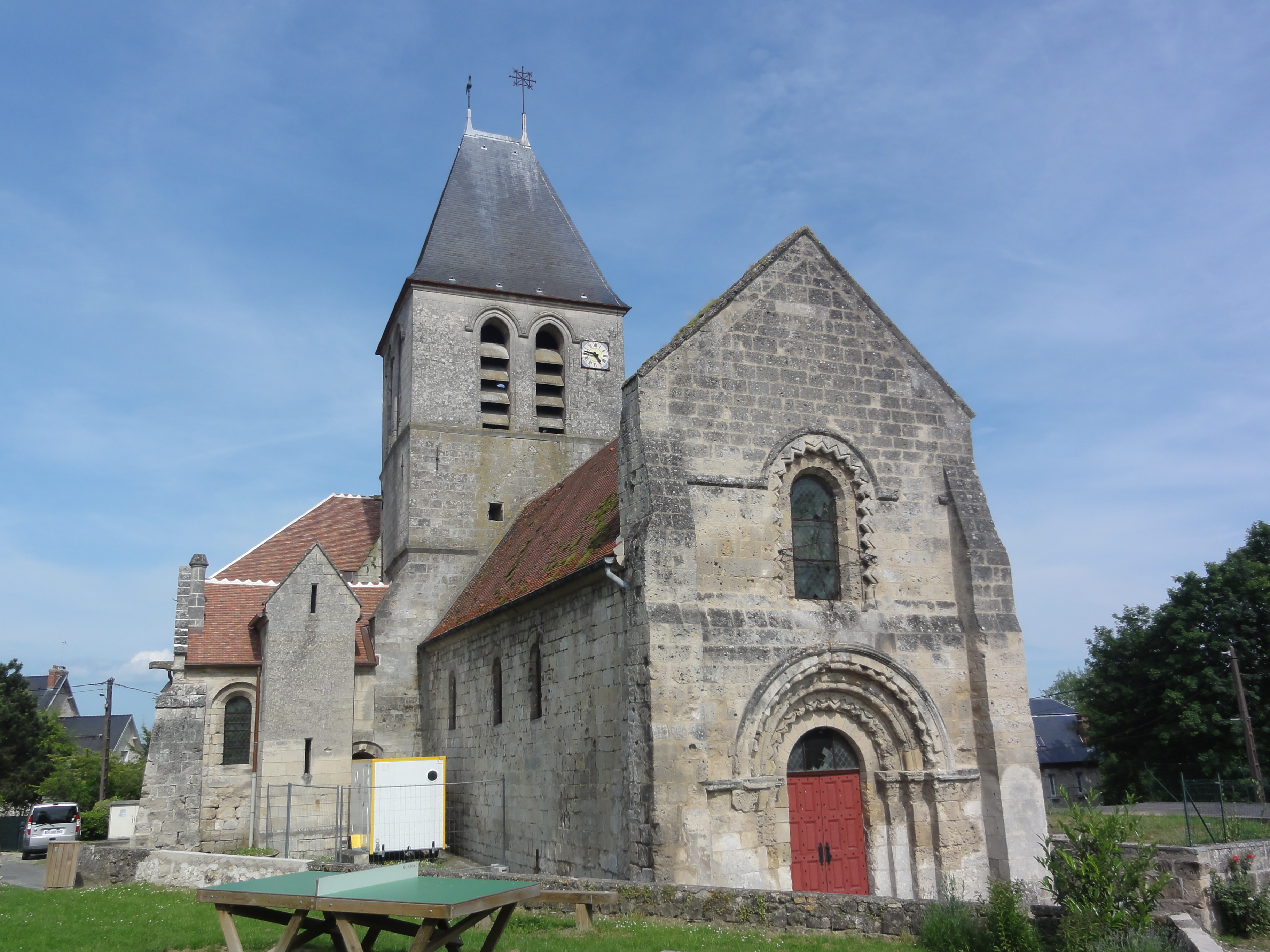 Église Saint-Pierre et Saint-Paul de Condé-sur-Aisne